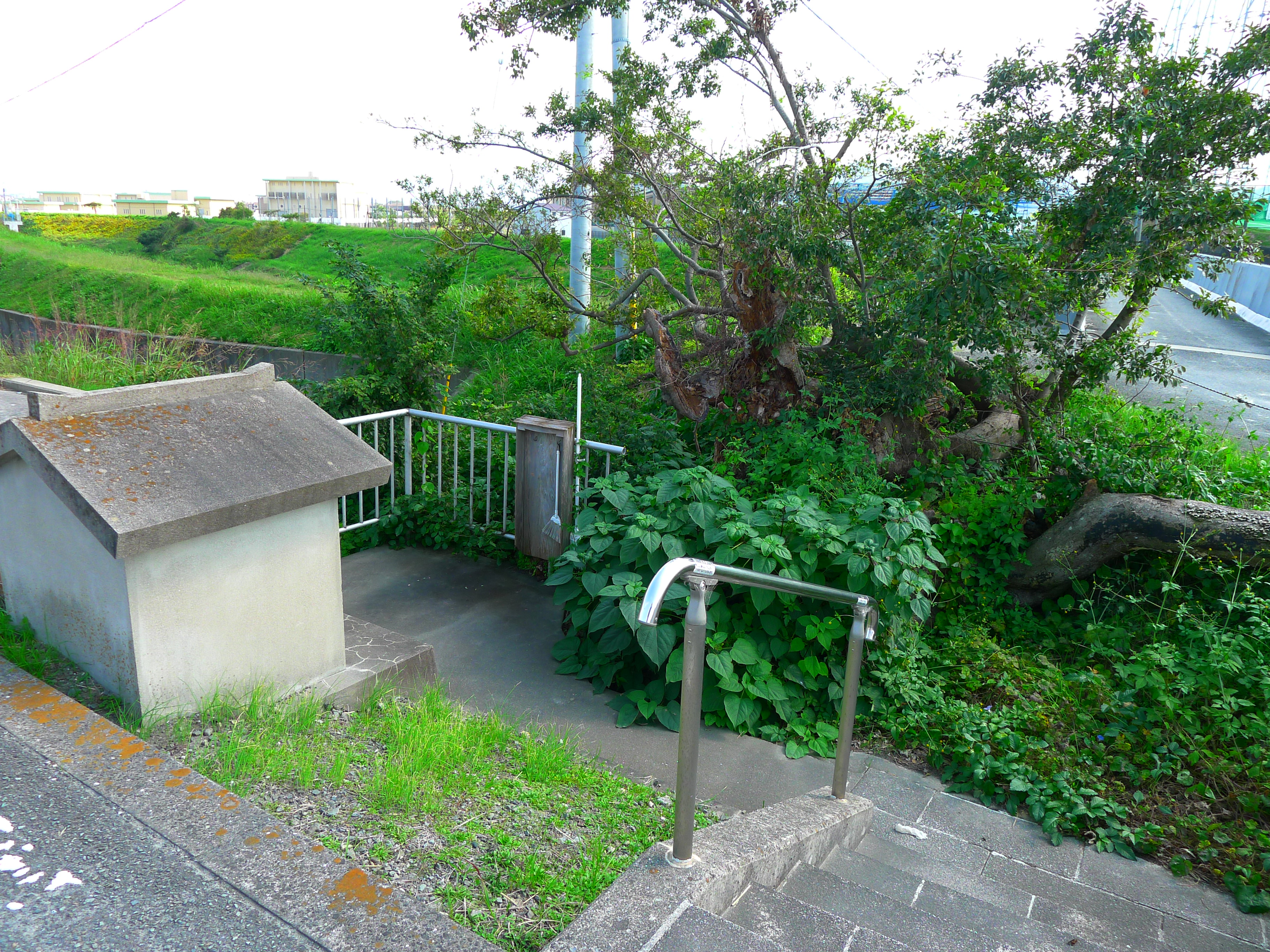 熊野古道・紀伊路の紀ノ川を渡るための川辺渡し場跡付近。水神祠が祀られている。